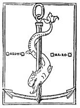 Aldus Manutiuse poolt 1501. a. kasutusele võetud kirjastuse logo.